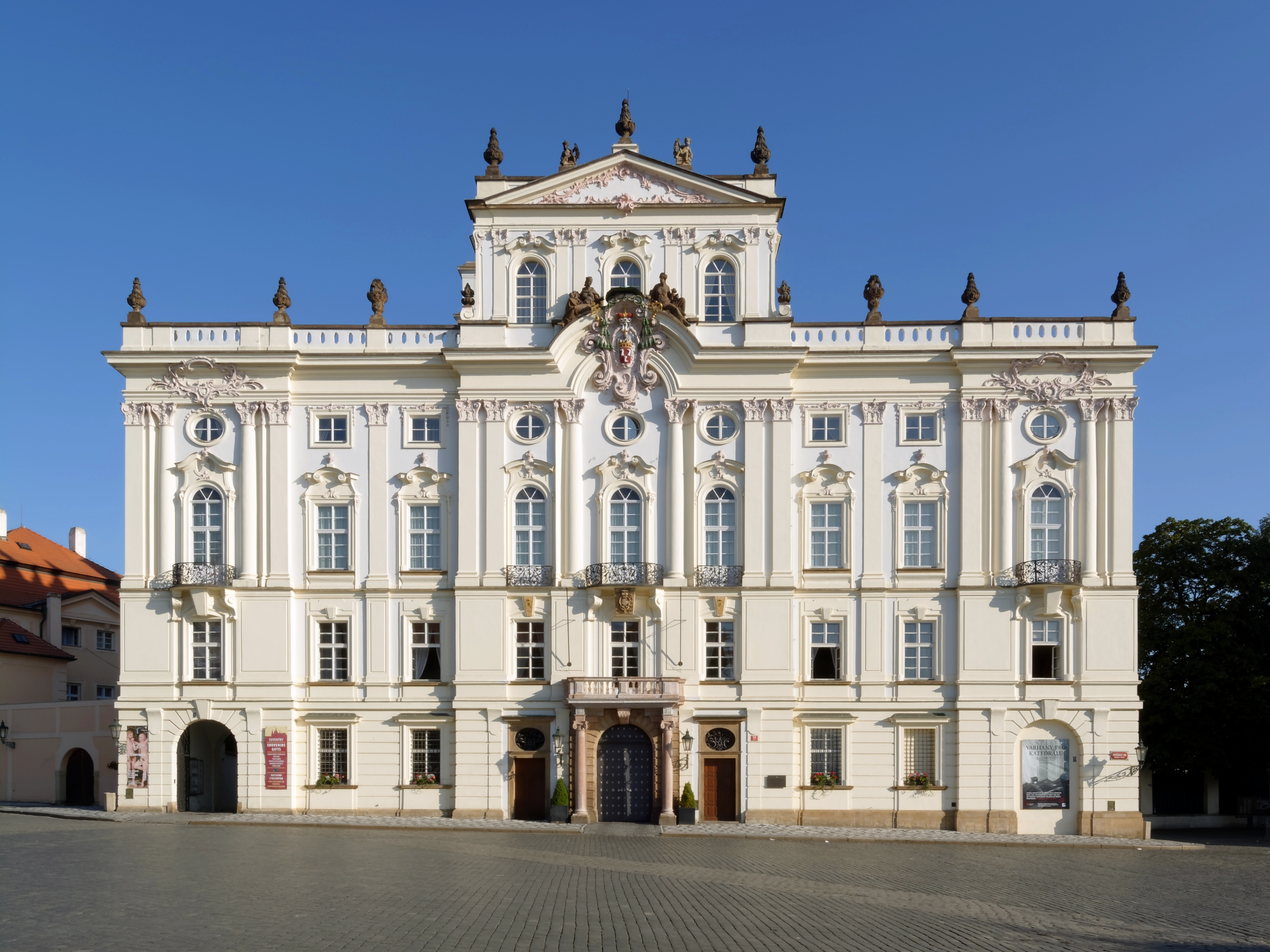 Arcibiskupský palác, Hradčanské náměstí 56/16, Hradčany.